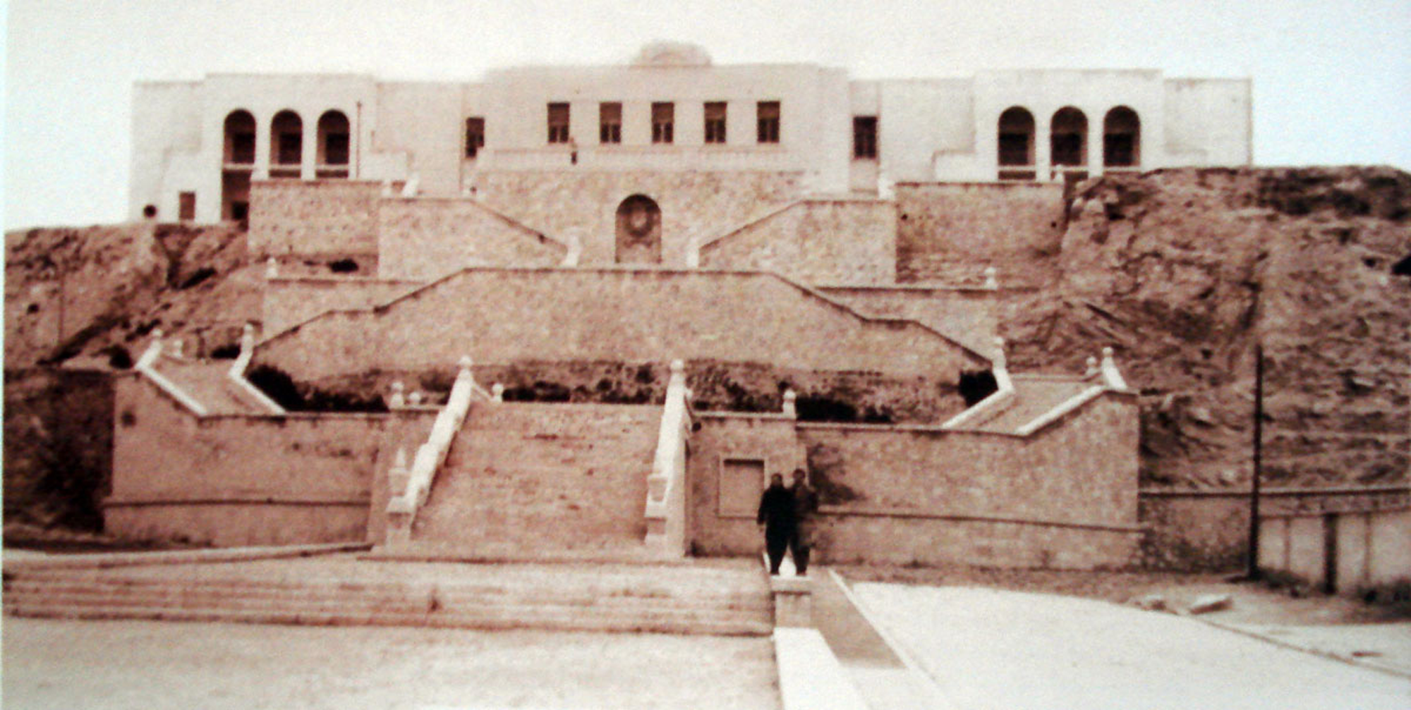 Foto antigua al Instituto Jorge Juan desde la avenida del Gral. Marvá